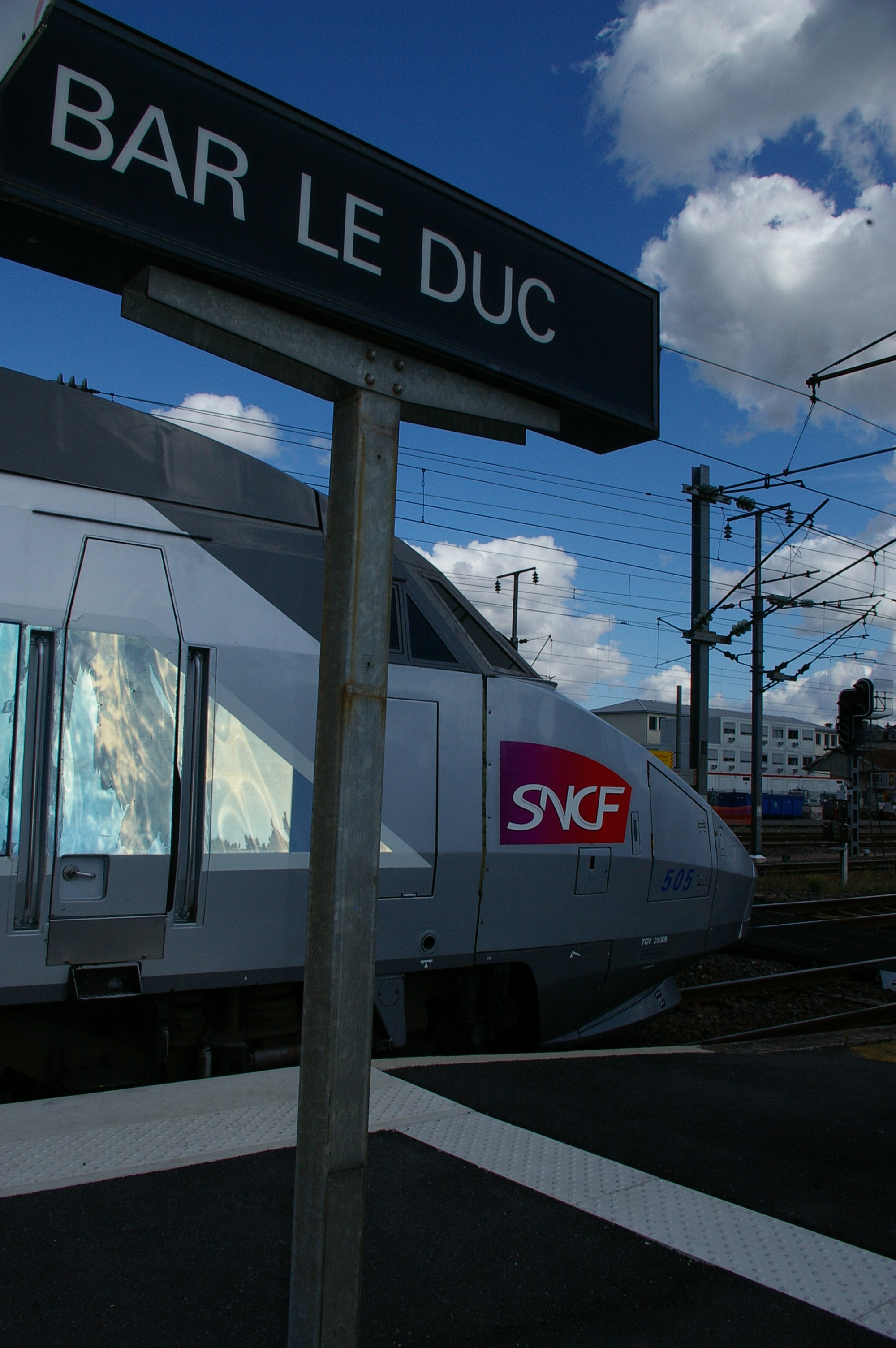 gare de bar le duc. TGC à quai